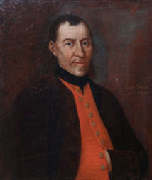 Franz Altmutter: Selbstbildnis in bäuerlicher Tracht